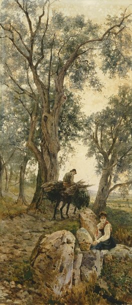 Acquerello di proprietà dell'Art Gallery of South West